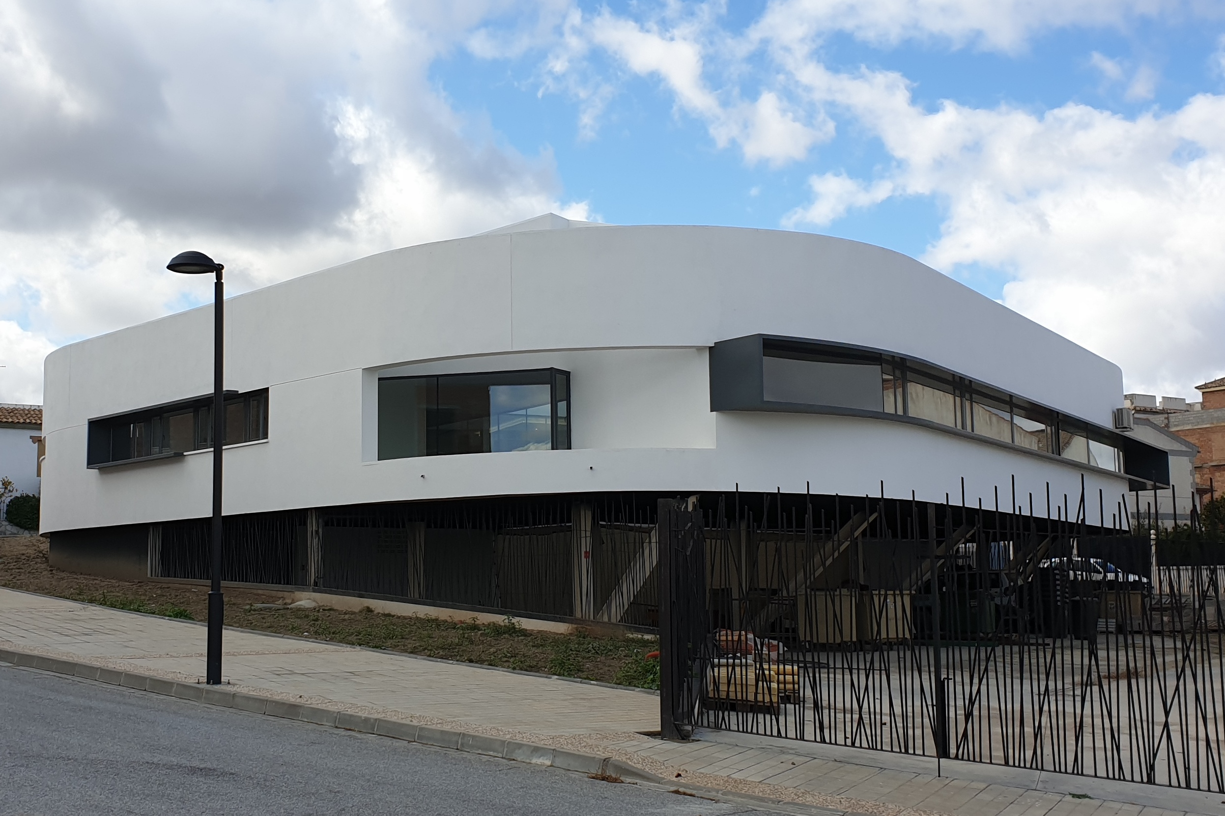 Vista del nuevo consultorio médico de Láchar, en la provincia de Granada (España). Inaugurado en 2019.